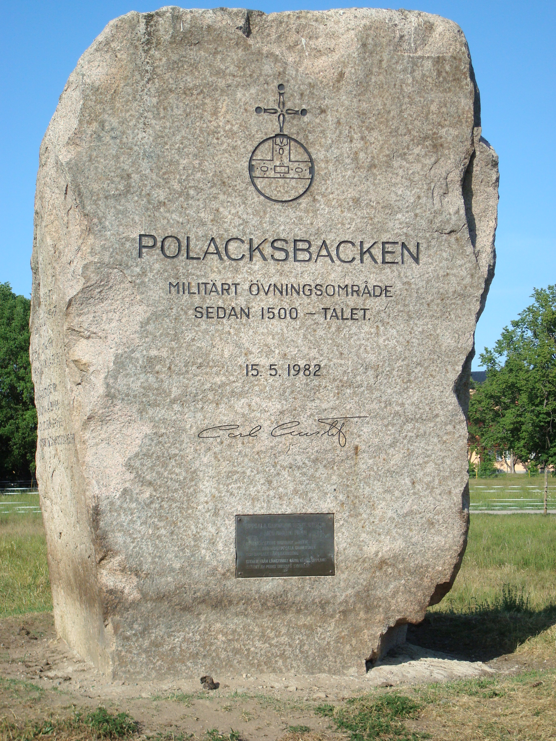 Sten på fältet vid Polacksbacken